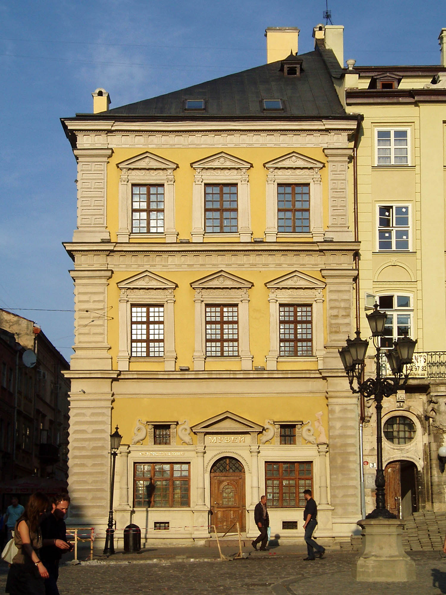 Палац Бандінеллі у Львові. Збудований у XVI ст.